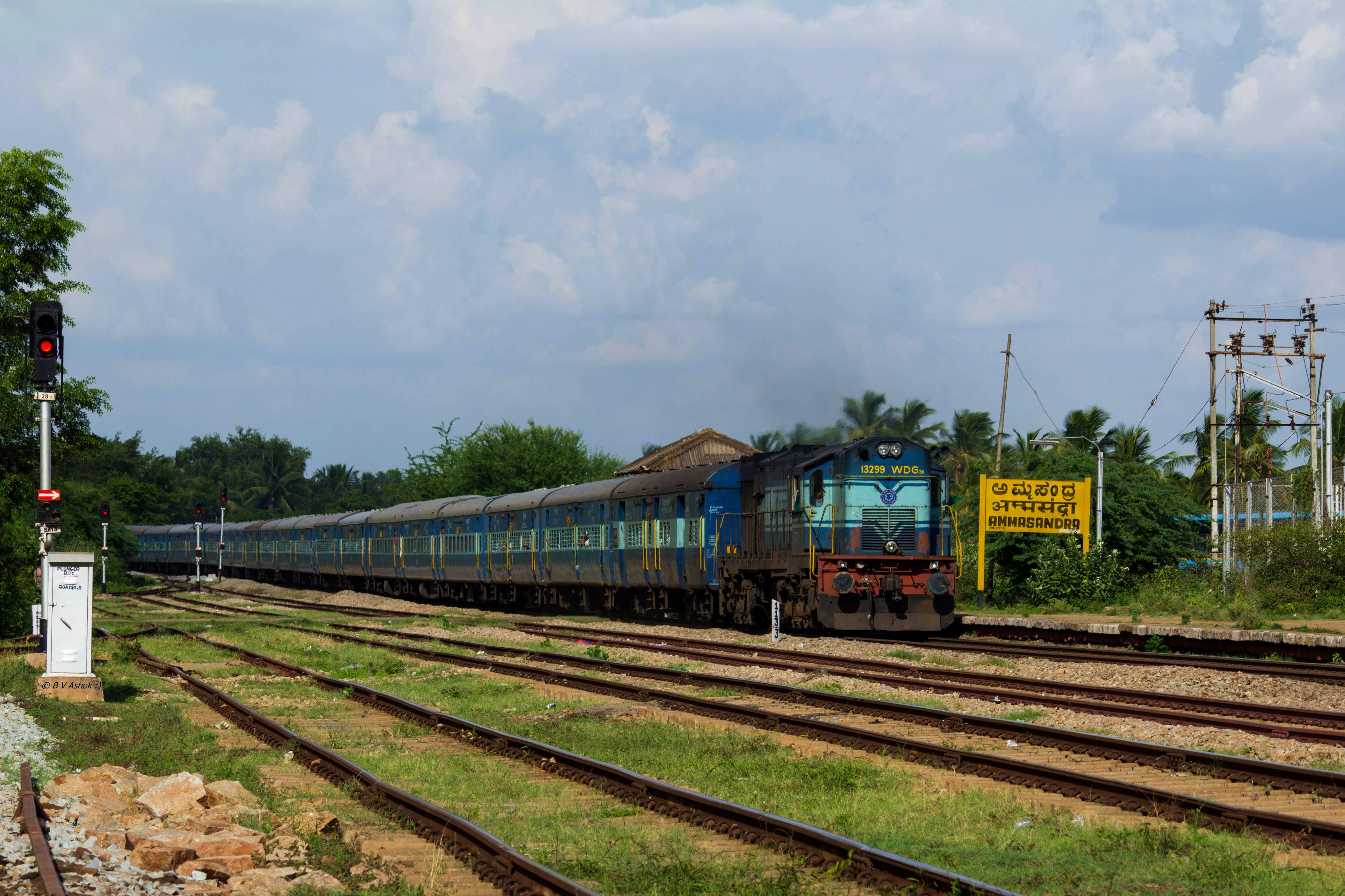 KJM WDG-3A 13299 chugging past Ammasandra with 17316 Velankanni - Vasco-da-gama Express...